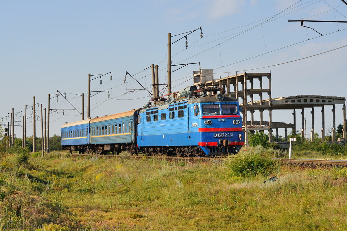 Электровоз ВЛ60ПК-2251 с пригородным поездом Долинская - Тимково - Помошная, перегон Тимково - 127 км